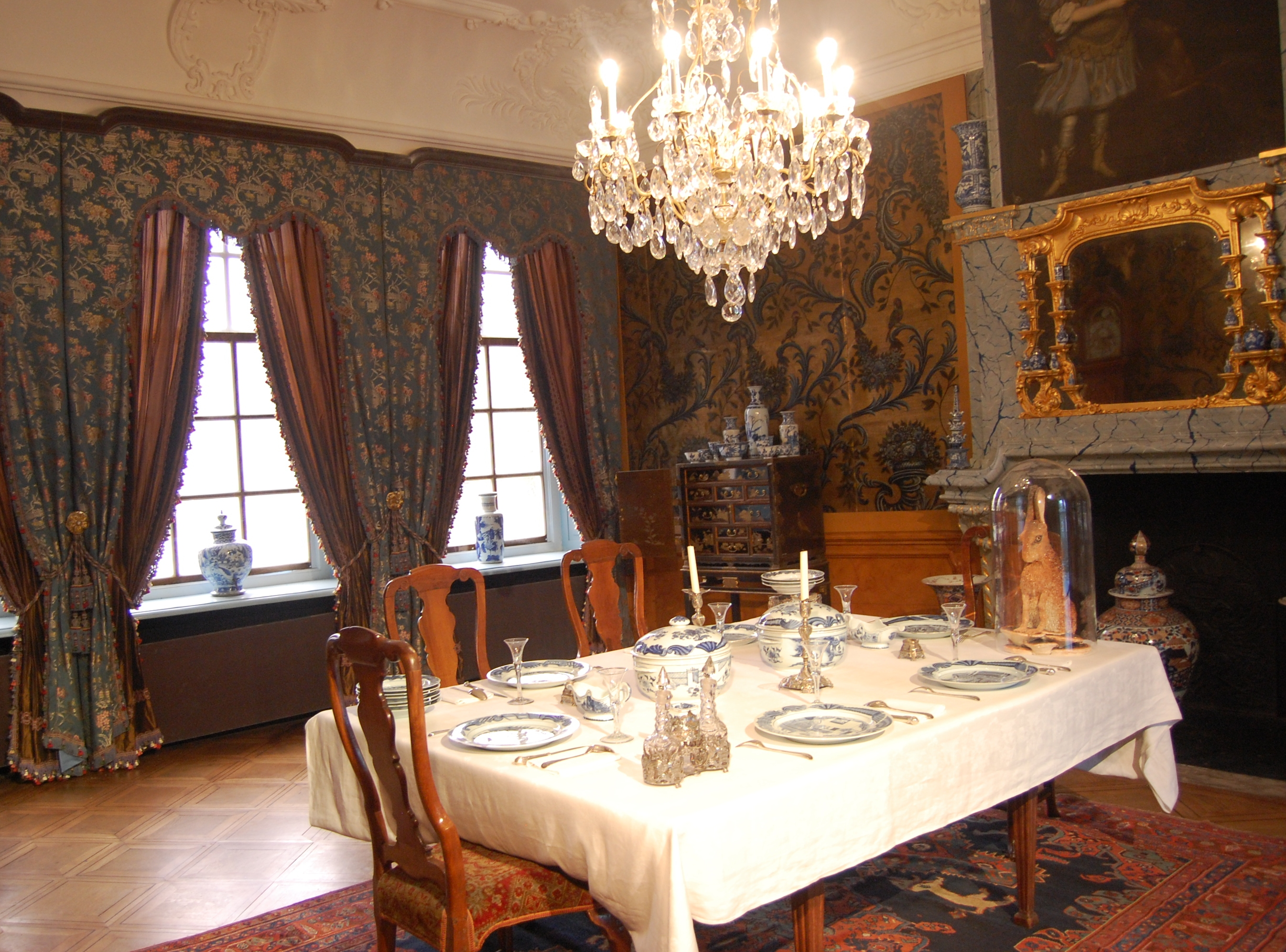 Keramiekmusem Leeuwarden Princessehof. Stijlkamer van prinses Maria Louise van Hessen-Kassel